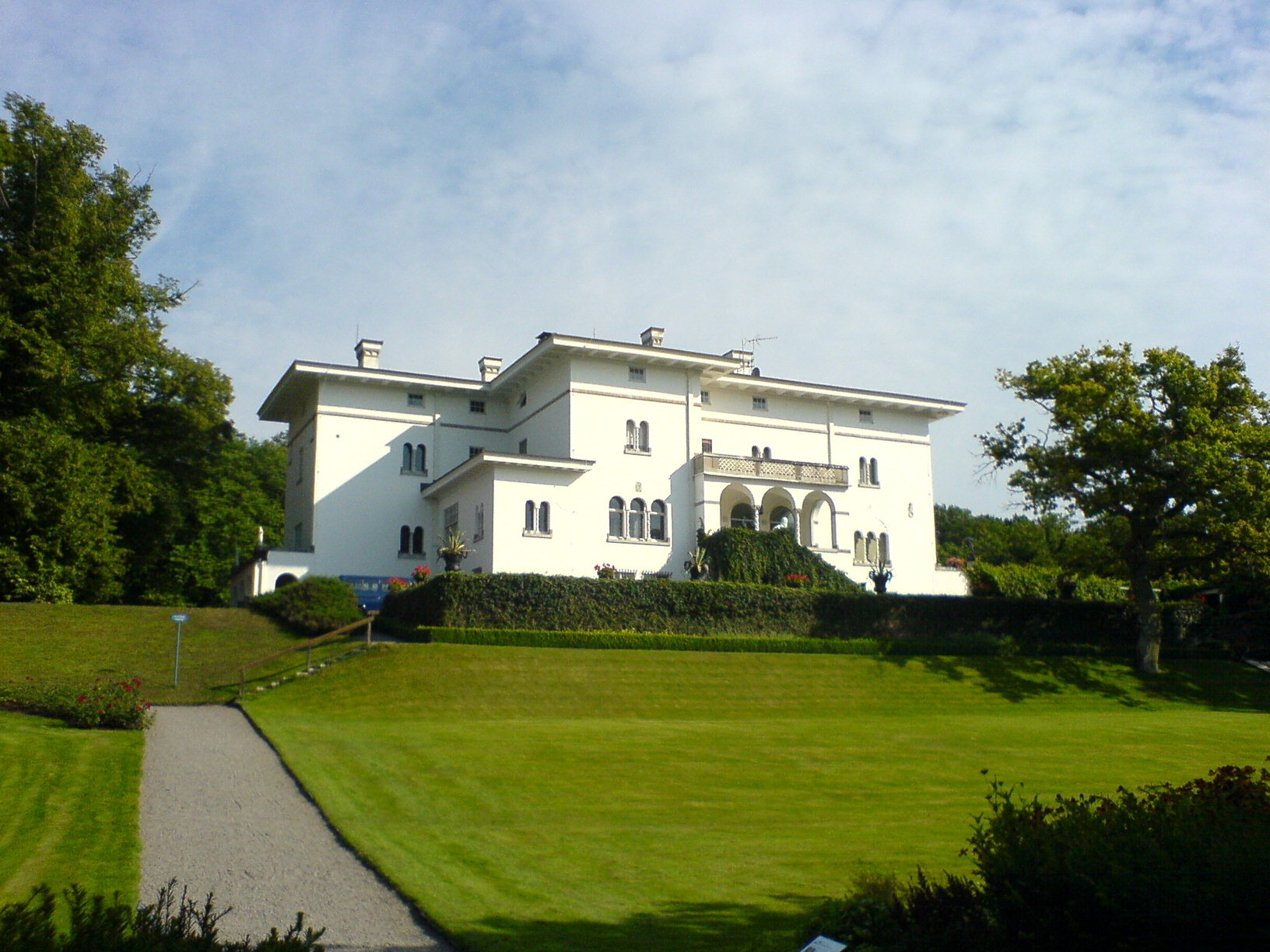 solliden slott